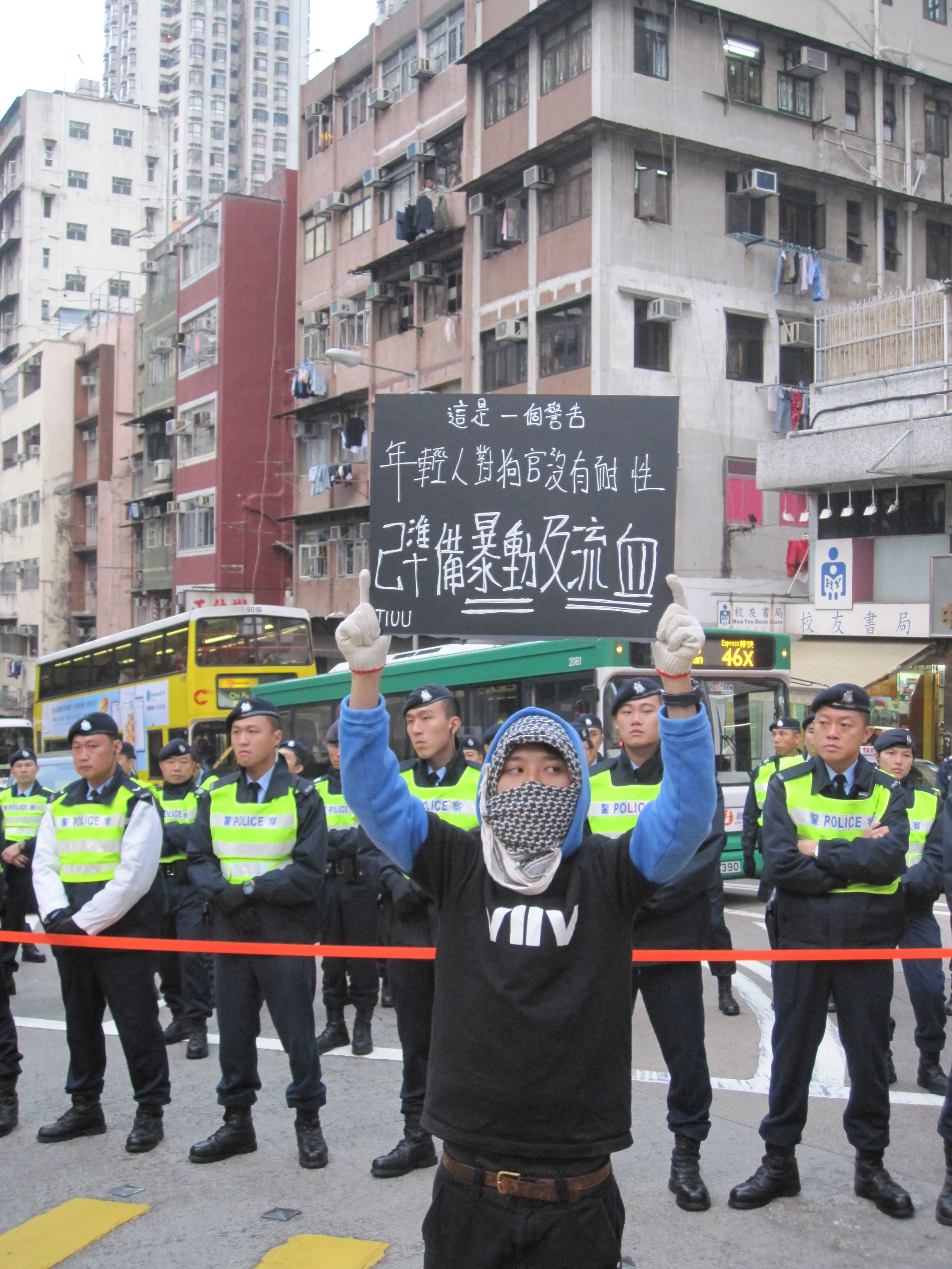 中文（香港）: 「還我普選」元旦大遊行中遊行人士高舉的紙牌